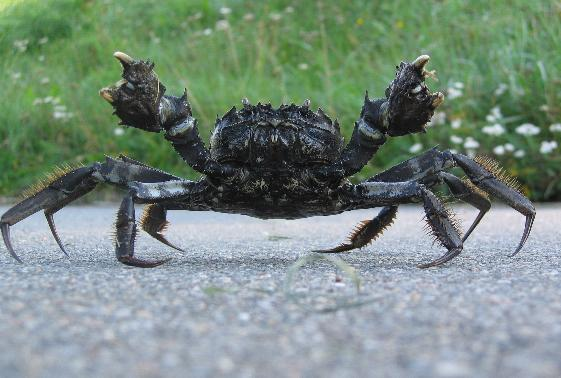 Chinesische Wollhandkrabbe an der Elbe in Angrifsstellung